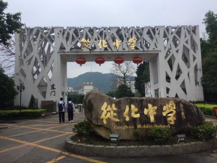 中文（中国大陆）: 从化中学大门